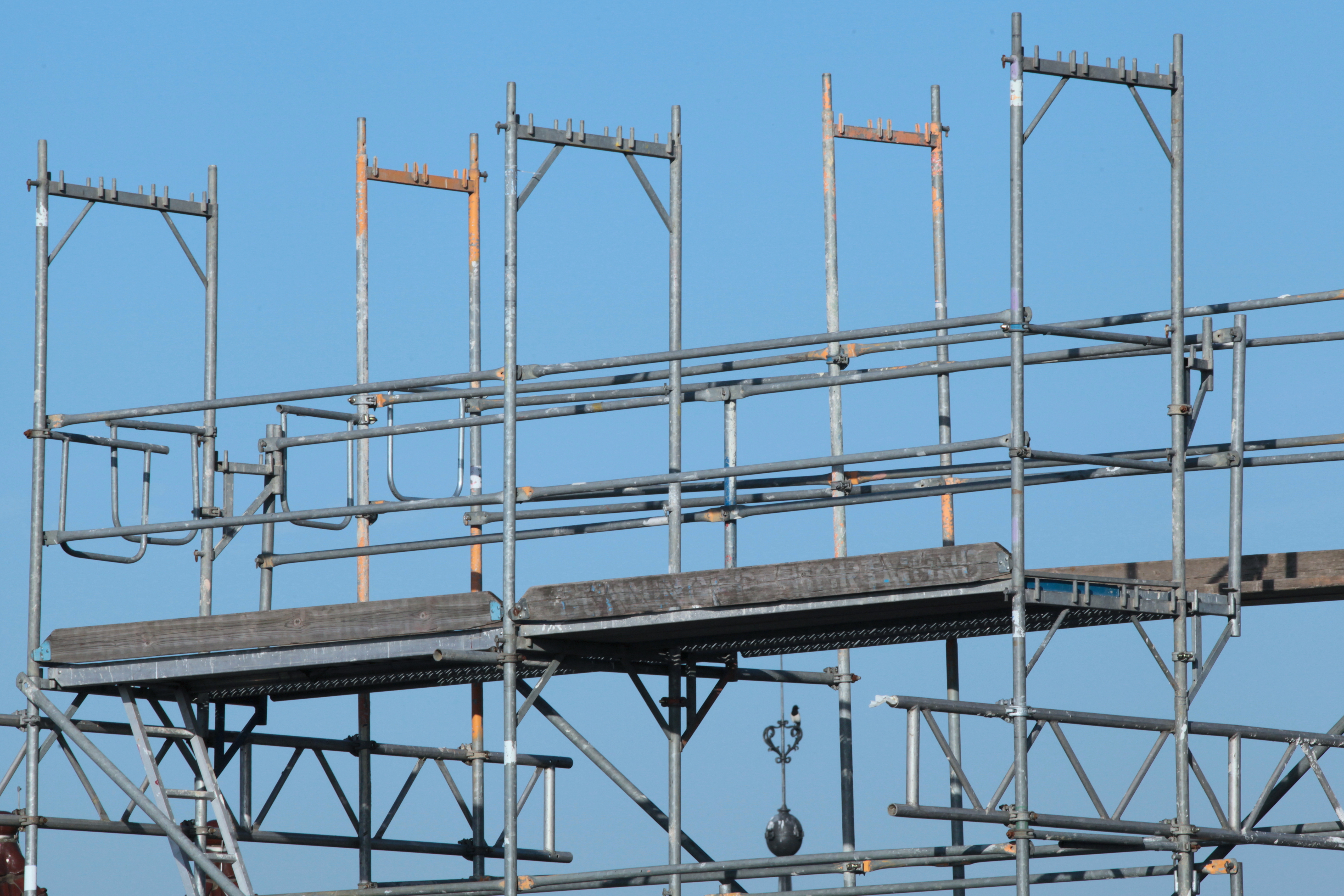 Blick von Schacht 2 auf das Verwaltungsgebäude der Zeche Zollern 2/4 in Dortmund